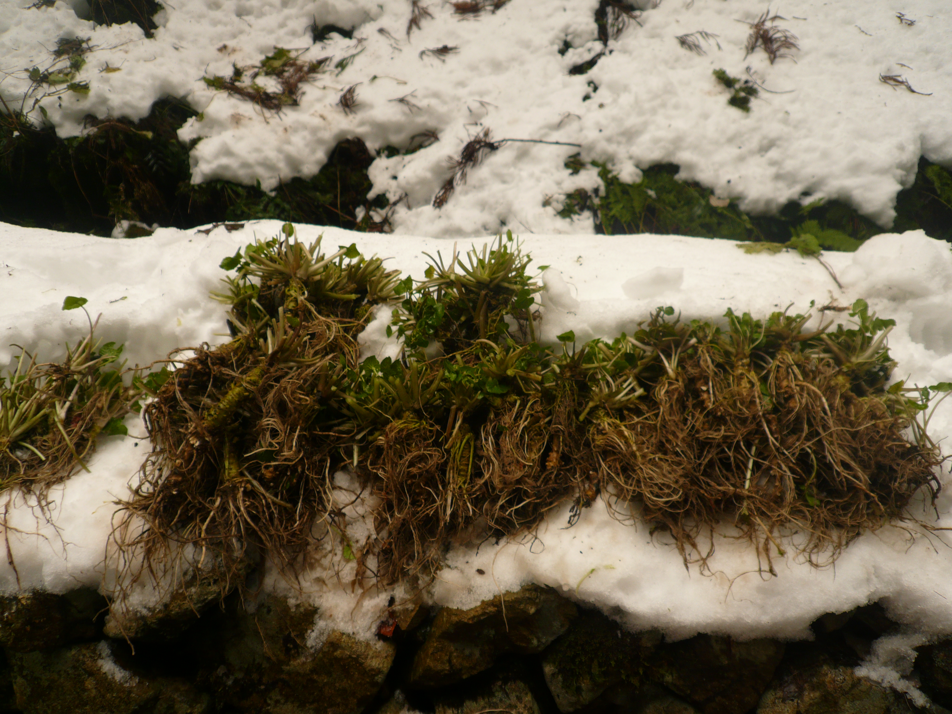 収穫直後の匹見ワサビ。この後１時間以上かけて下山し、自宅でヒゲ根の部分を除去するなど、出荷準備に追われる。